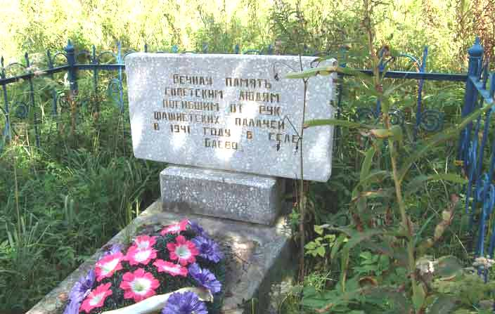 Памятник убитым о время Холокоста евреям деревни Баево Дубровенского района Витебской области.